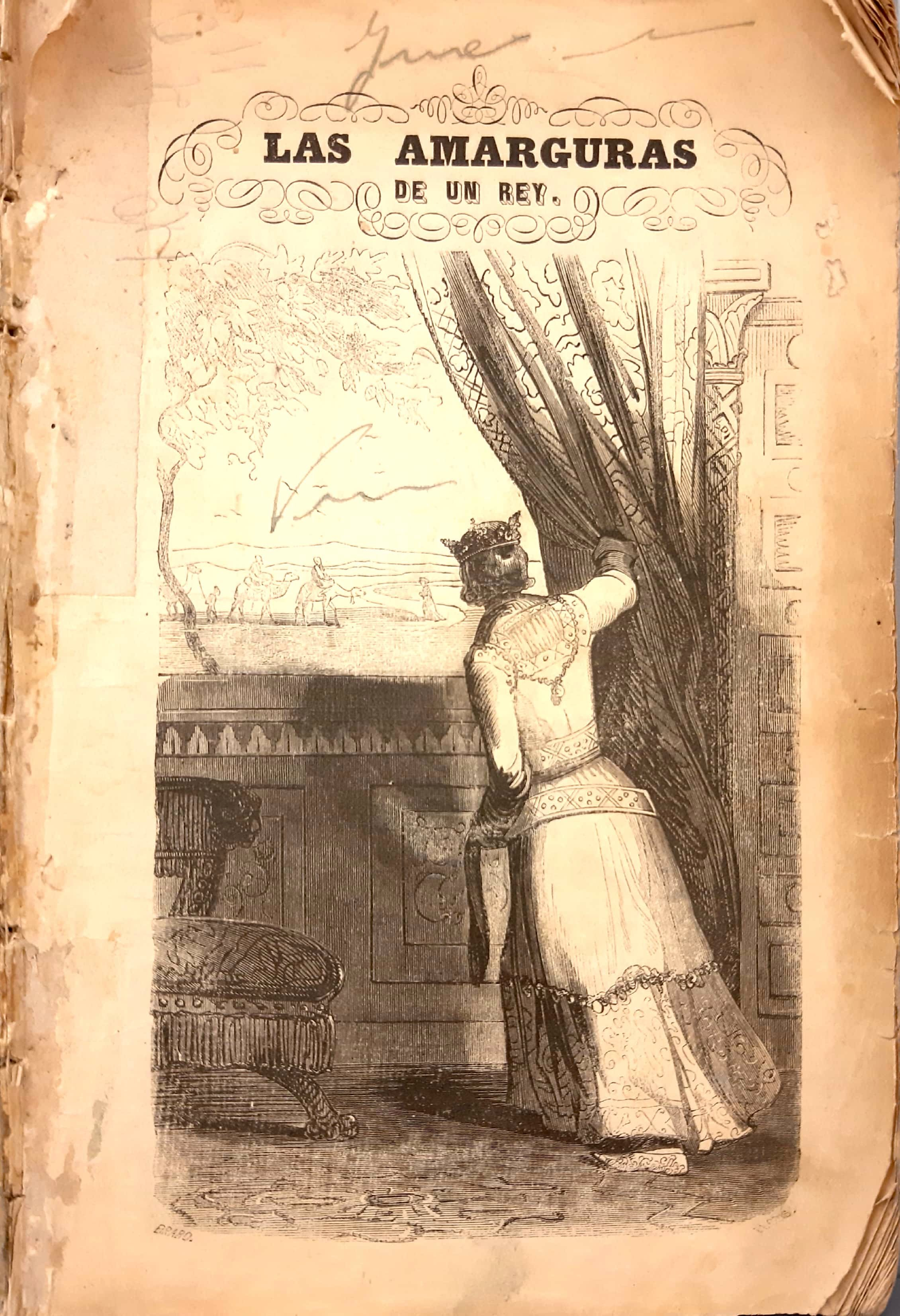 Autor: Jover, Nicasio Camilo (1821-1881) Título: Las amarguras de un Rey : novela histórica original / de Don Nicasio Camilo Jover. Publicación: Madrid : [s.n.], 1856 (Imprenta de la Compañía general de Impresores y libreros del reino á cargo de D. A. Avrial) Descripción física: 383 p., [6] h. de lám. : il. ; 22 cm. Notas: Antep. grab. Texto enmarcado. Notas: Las il. entre el texto.